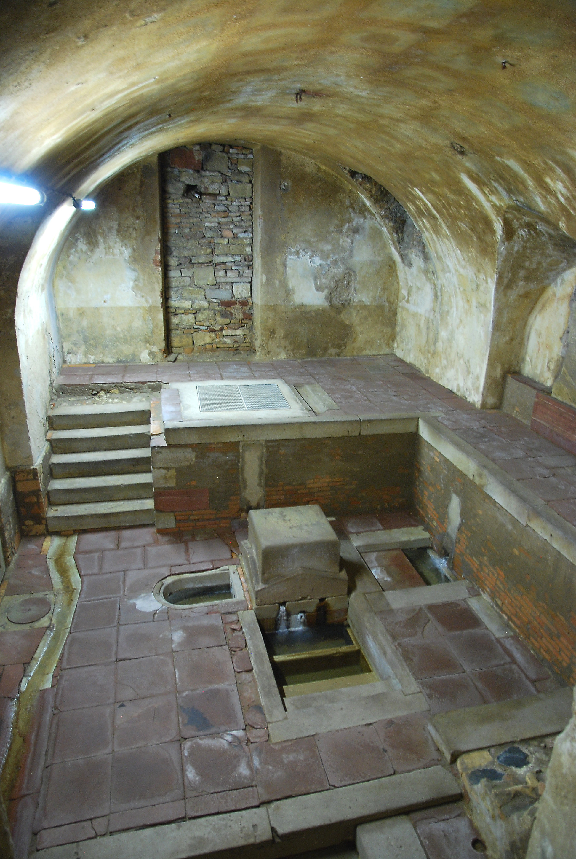 Hauptraum des Sironabads in Nierstein